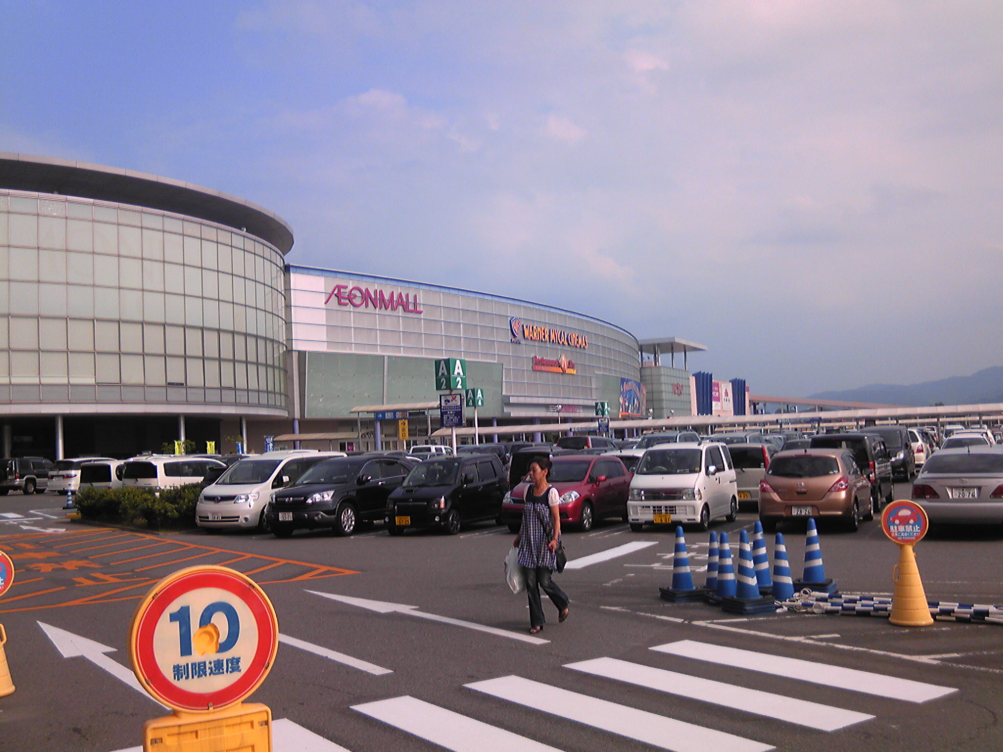 イオンモール福岡ルクル（福岡県糟屋郡粕屋町）